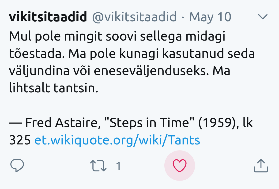 Vikitsitaatide Twitteri konto tsiteerib Fred Astaire'i tantsimise teemal